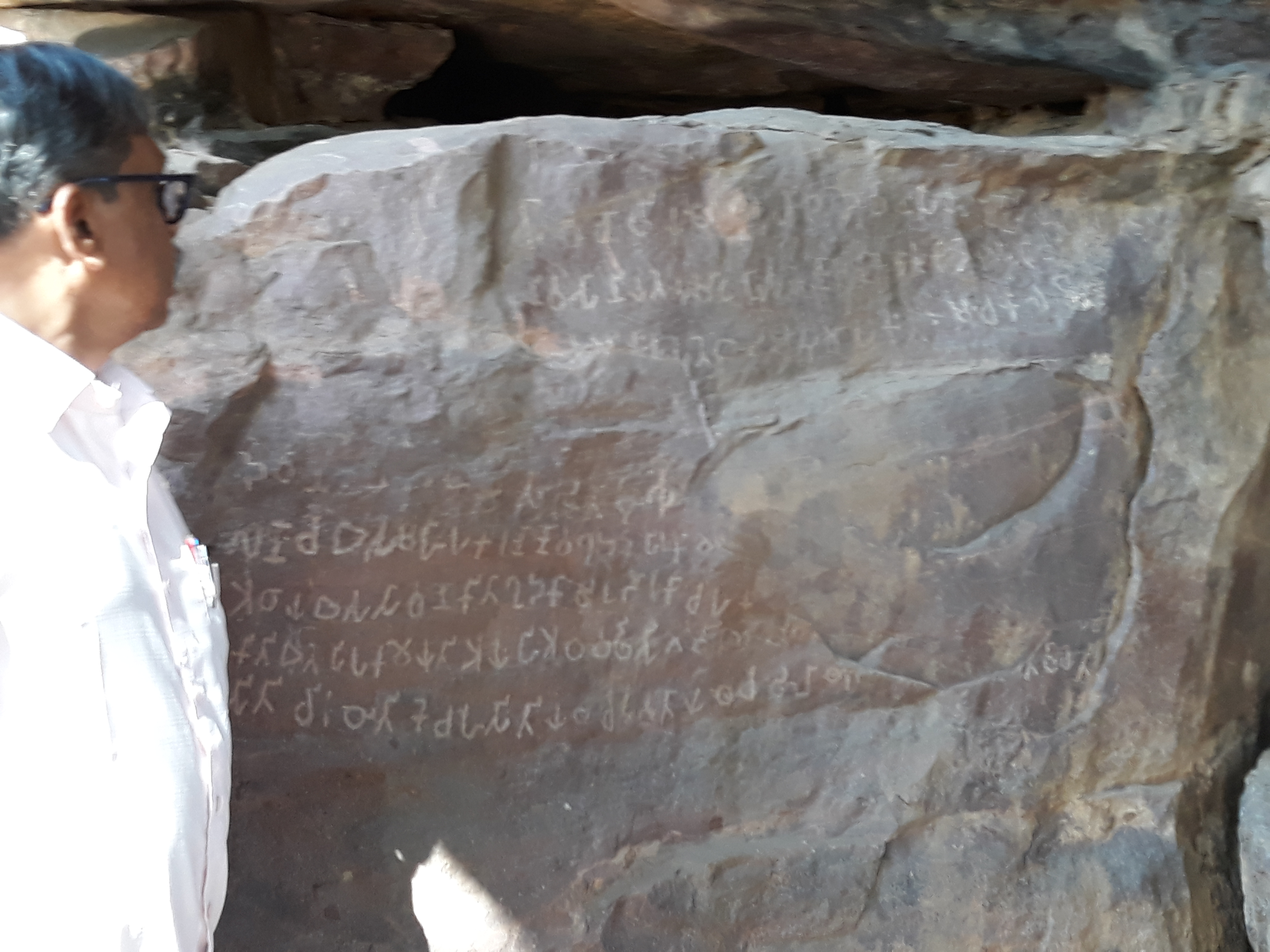 मध्य प्रदेशातील पांगुरारिया गावा जवळील सम्राट अशोकाचा हा लधु शिलालेख मजकूर मी वाचत असताना माझ्या पत्नीने (१० फेब्रुवारी २०१९ रोजी) टिपलेले छायाचित्र.